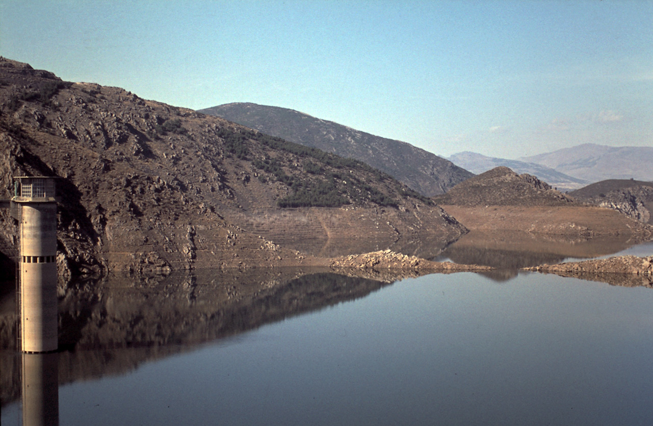 Torre de Toma del embalse del Atazar en septiembre de 1.976